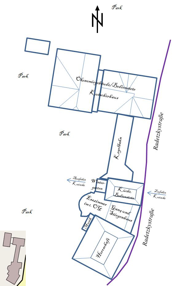 Übersicht Gebäudelage der der Villa Iwan Rosenthal, Radetzkystraße Nr. 1 in Hohenems, Vorarlberg, Österreich.